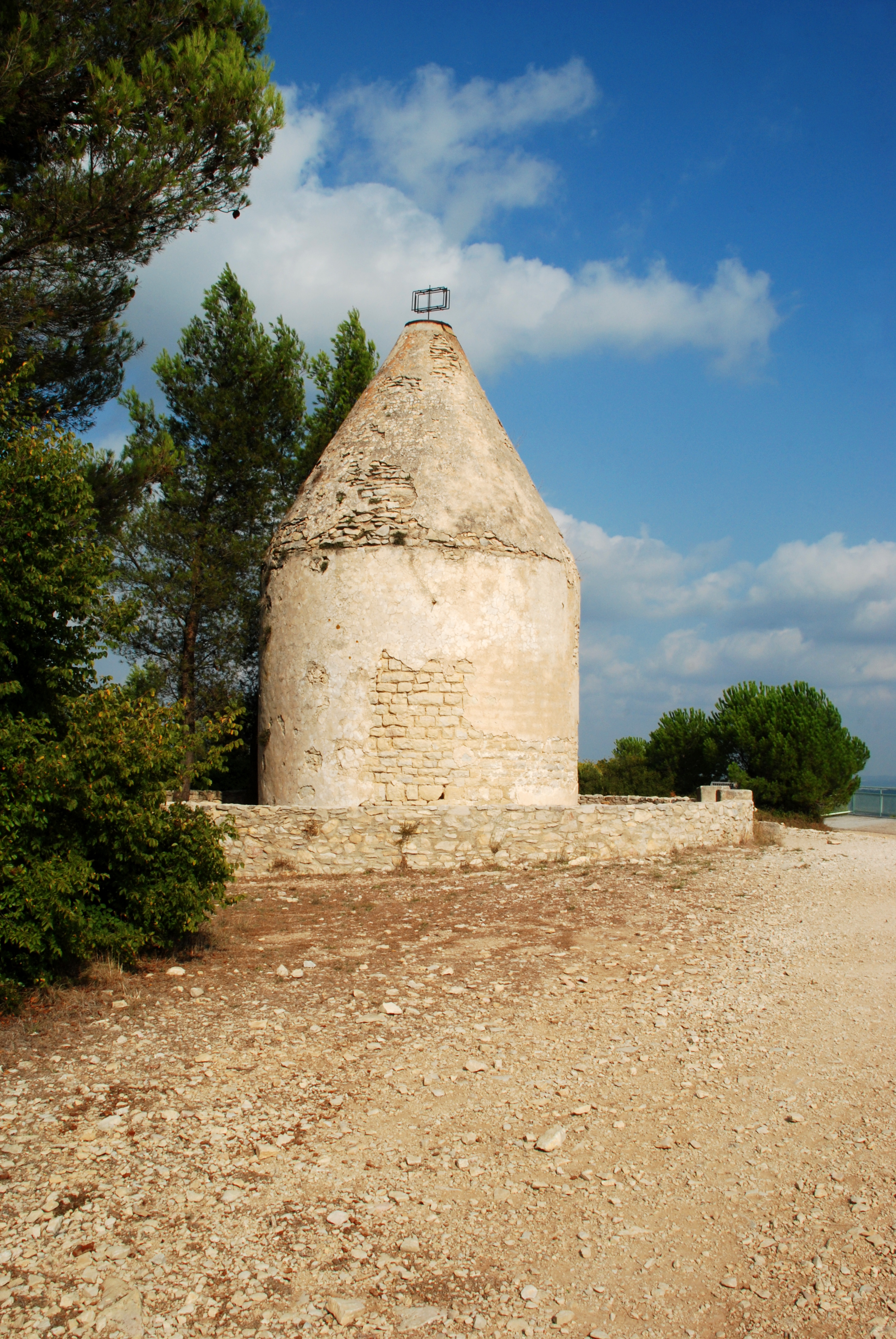 France - Gard - Calvisson - Roc de Gachone